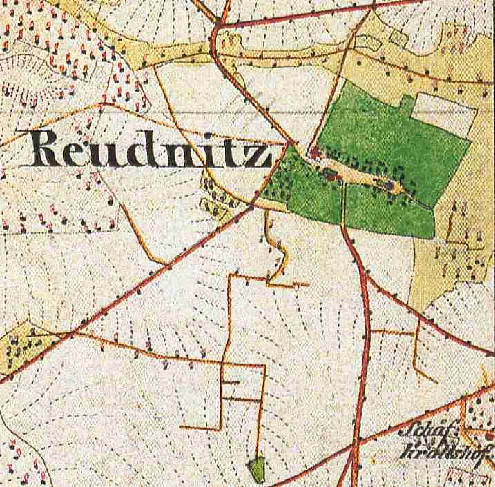 Reudnitz, Ortsteil der Stadt Friedland, Landkreis Oder-Spree, Brandenburg, Ausschnitt aus dem Urmesstischblatt 3851 Beeskow von 1846